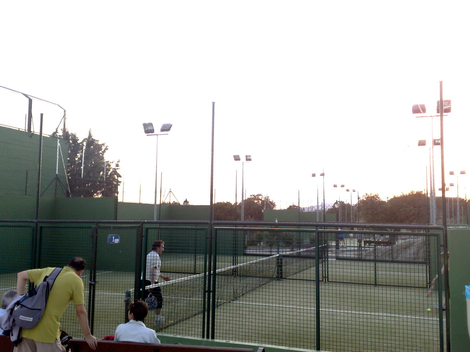 Torrelodones. Polideportivo. Pistas de pádel.